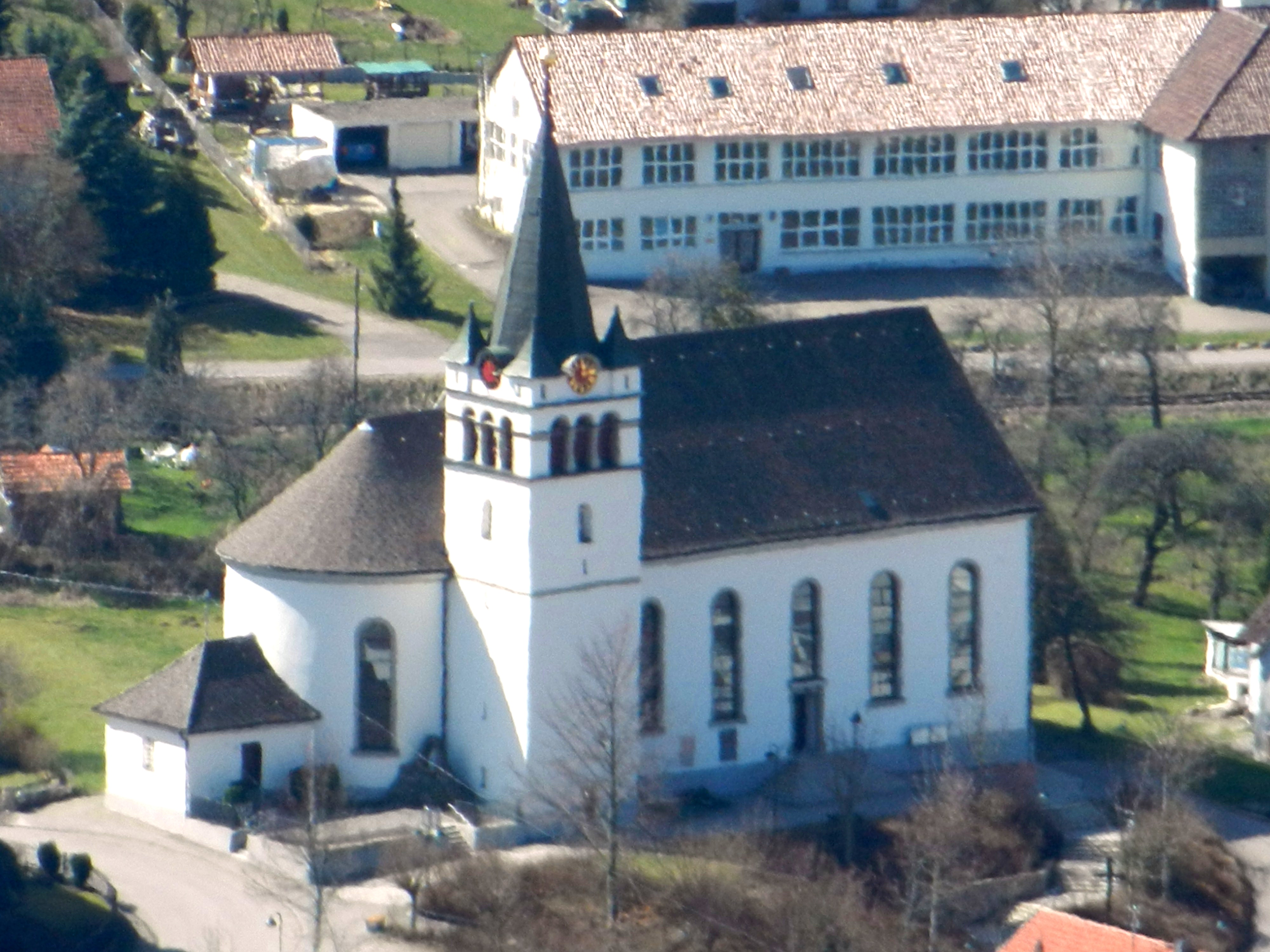 Kirche St. Sylvester in Jungingen